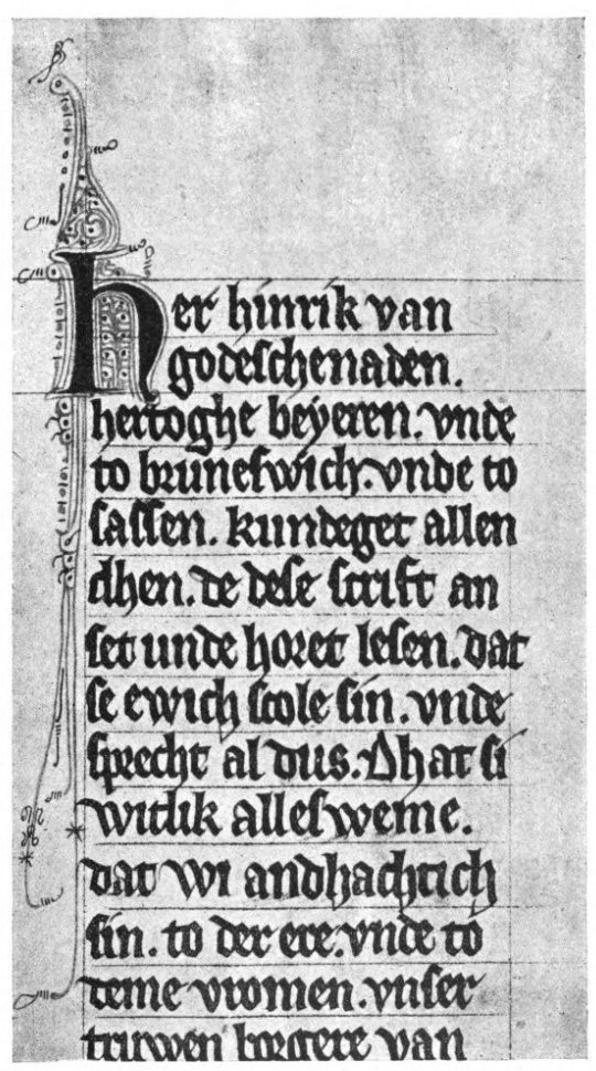 Seite aus: Bardewikscher Codex, heute Jurjewetz / Jurjewez, Kunsthist. Museum, ЮКМ-2010 [früher Lübeck, Stadtarchiv, Hs. 734]